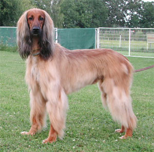 Afghanischer Windhund; Taziban Ozarq aus Österreich